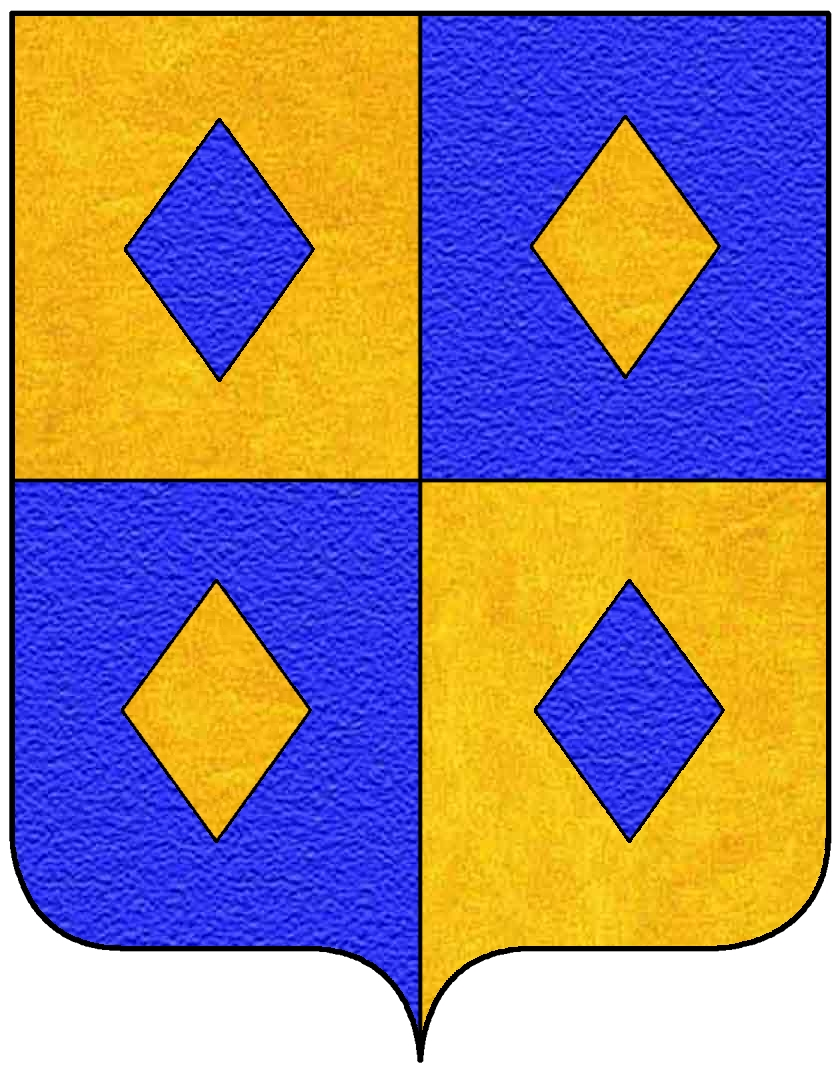 Stemma della famiglia Rospigliosi